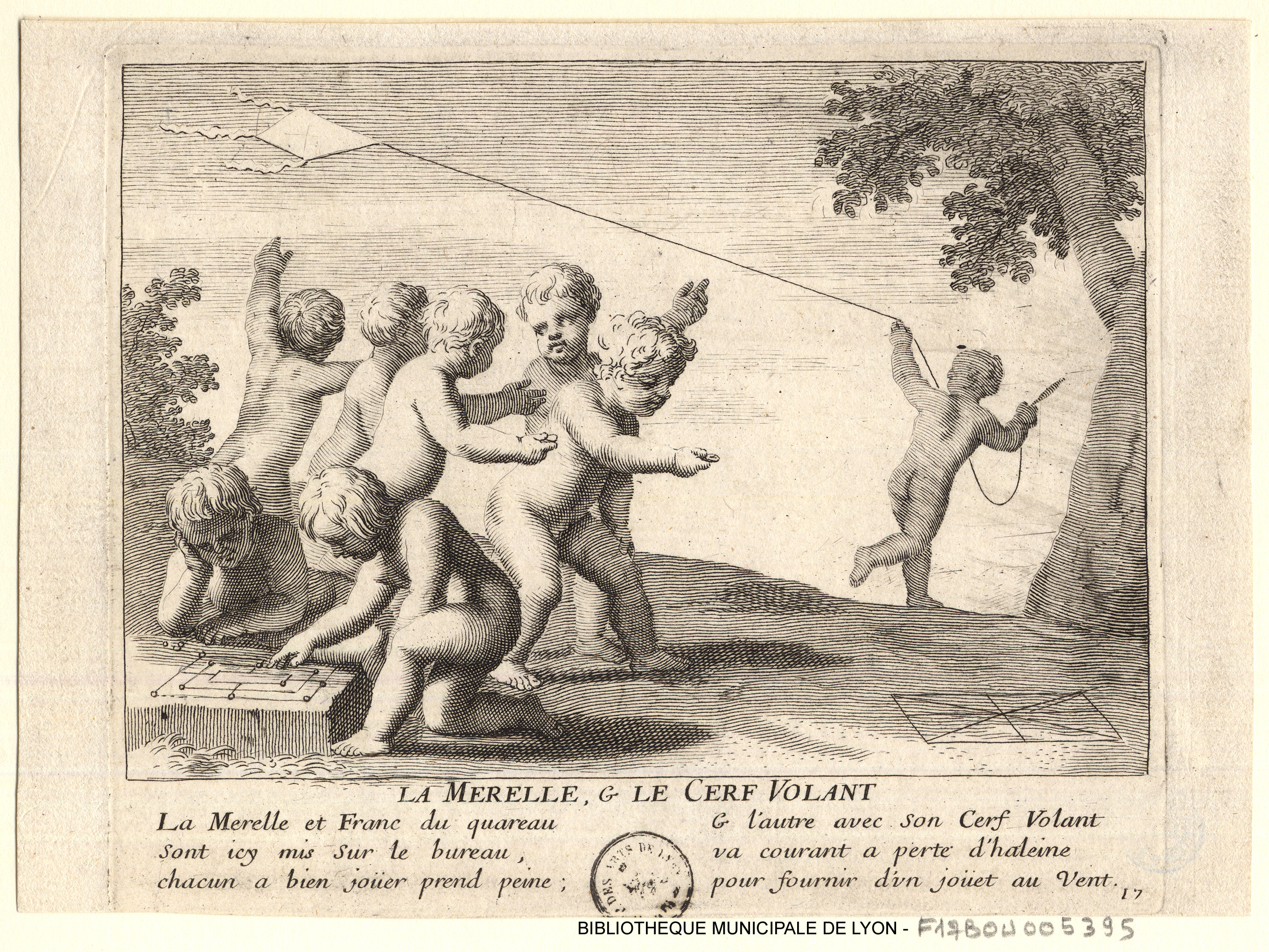 Jeux d'enfants